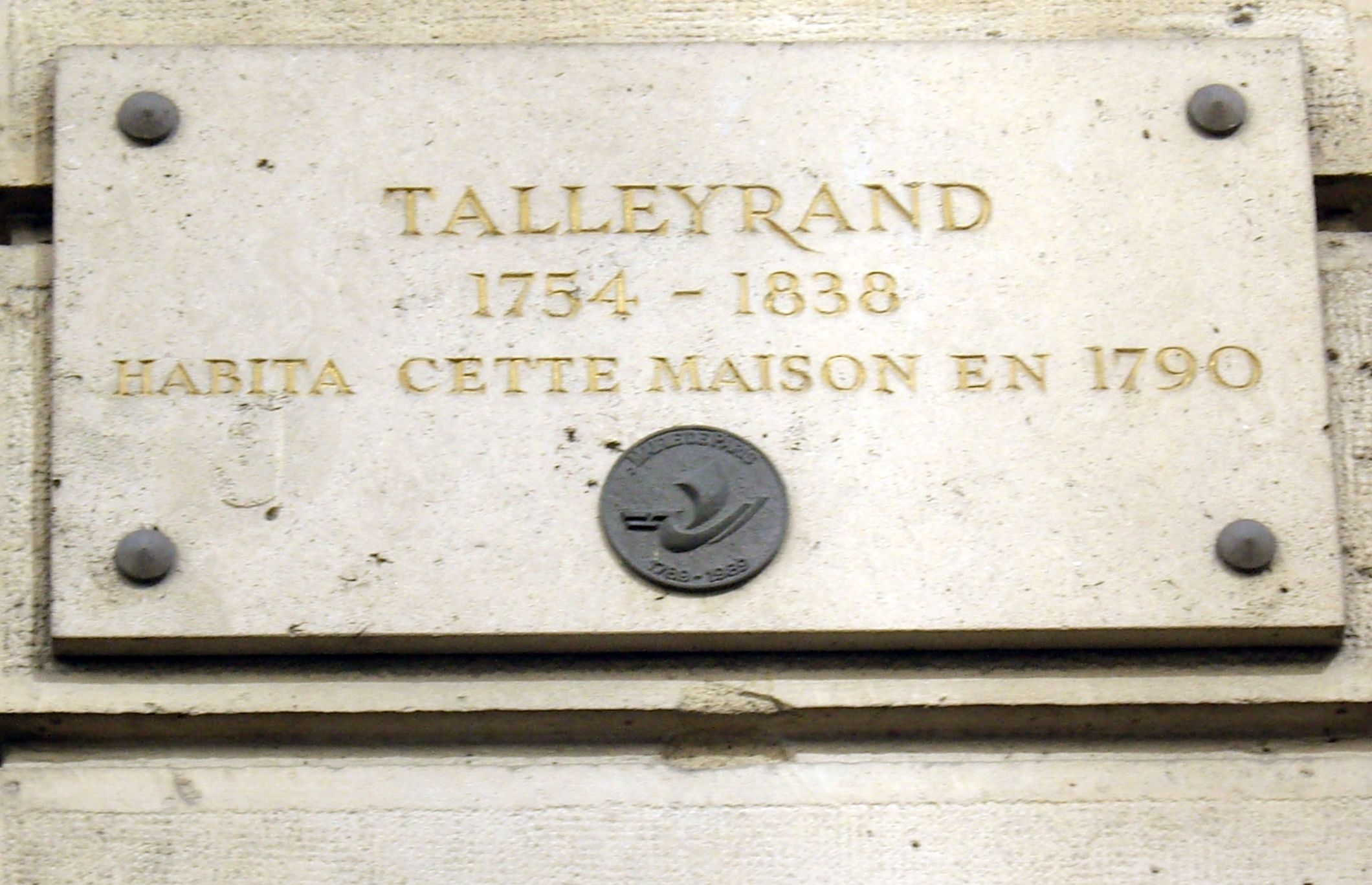 Plaque apposée au n° 17 de la rue de l'Université, Paris 7e, où habita Charles-Maurice de Talleyrand-Périgord (1754-1838) en 1790.